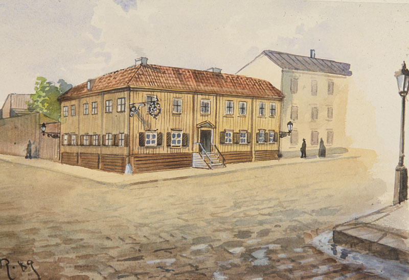 Källaren Hamburg vid Götgatan, kv. Vägaren